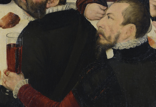 Als Epitaph für den Dessauer Fürsten Joachim (geb. 1509) gestiftet von seinen Neffen, den Fürsten Joachim Ernst und Bernhard. Anstelle der Apostel sind hier evangelische Theologen, u.a. Luther und Melanchton dargestellt. Der Mundchenk ist möglicherweise ein Selbstbildnis Cranach des Jüngeren. Der Siegelring, den diese Person trägt, zeigt die geflügelte Schlange.